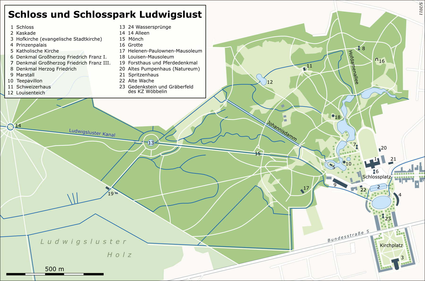 Karte von Schloss Ludwigslust This map may be incomplete, and may contain errors. Don't rely solely on it for navigation.